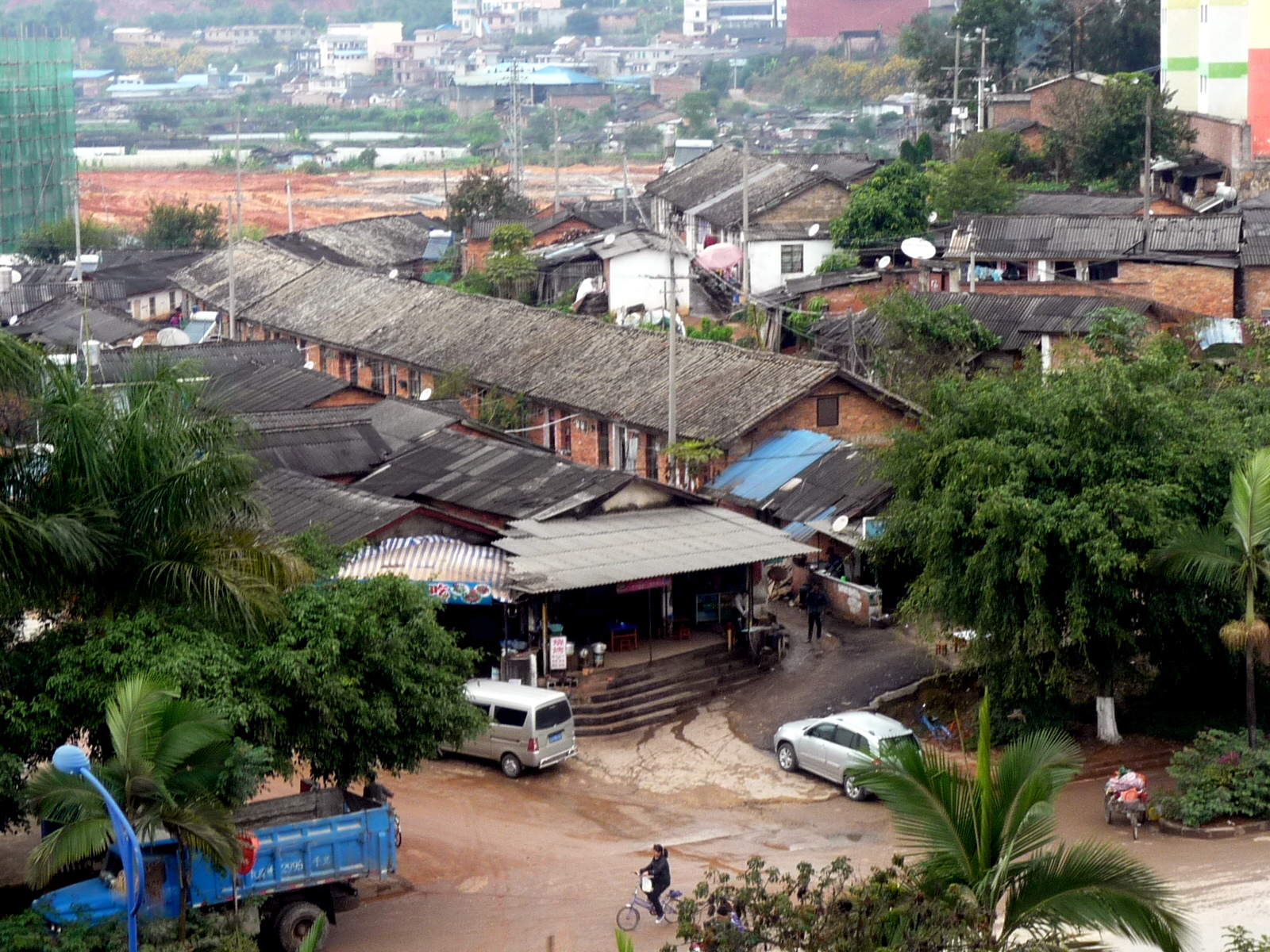 Les alentours de la gare routière de Pu'er, photographiés en décembre 2011